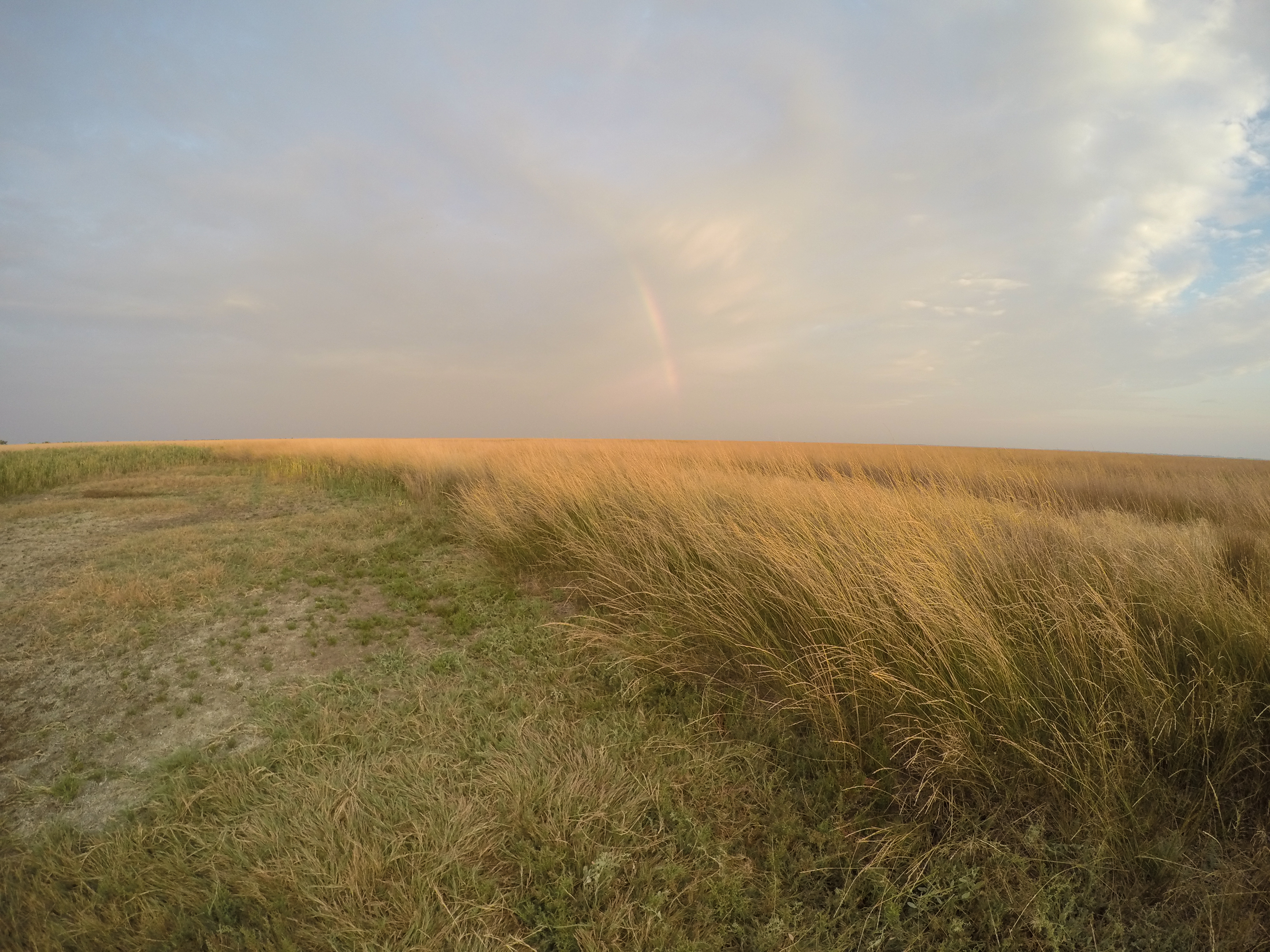 Знято під час експедиції на о. Джарилгач This photo/video of Dzharylhach was taken during Wikiexpedition to Dzharylhach supported by Wikimedia Ukraine. You can see all photographs in category Category:Wikiexpedition to Dzharylhach. English | українська | +/−